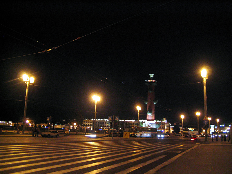 Strelka